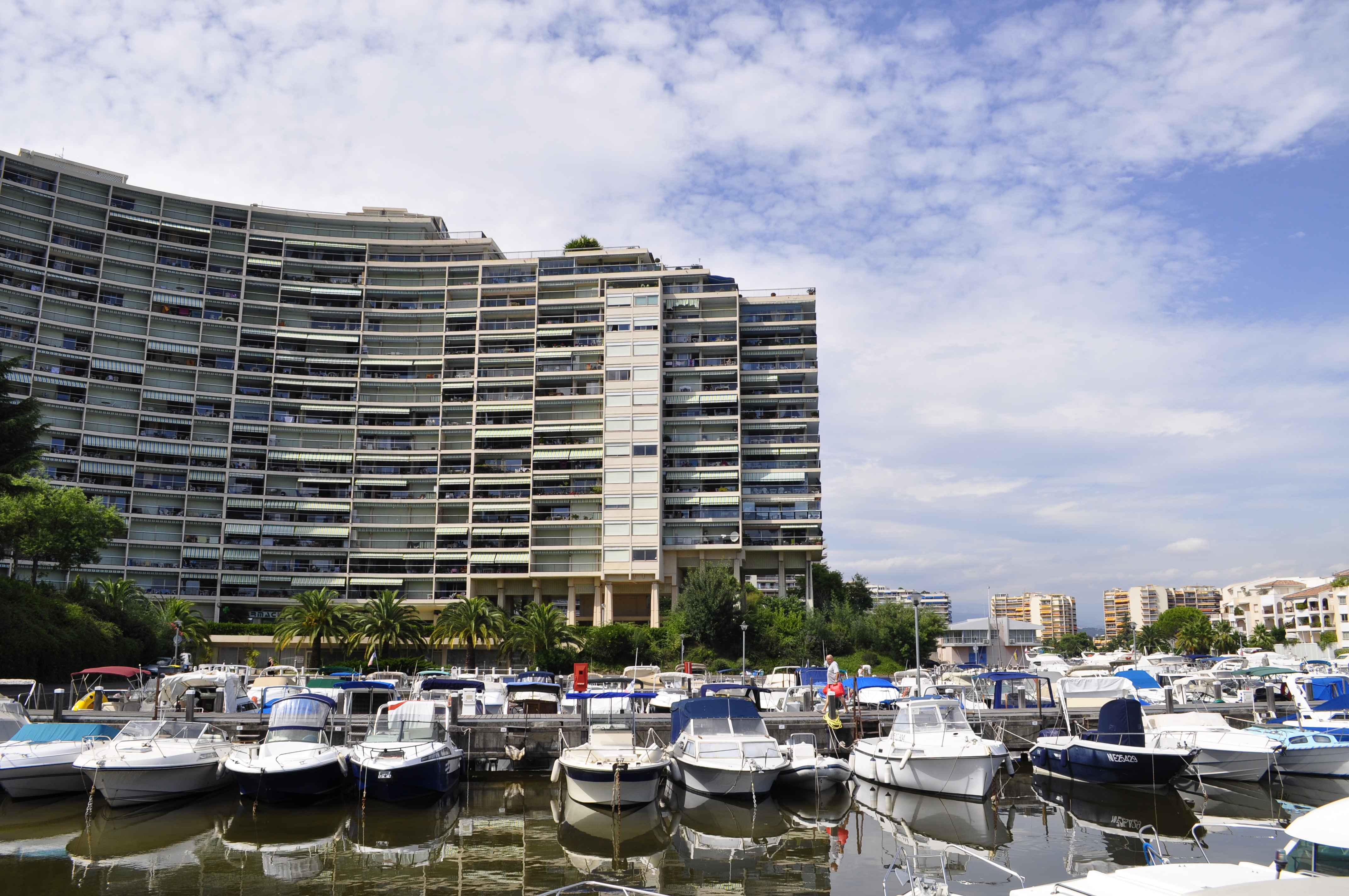 Mandelieu-la-Napoule : port de canne-Marina.